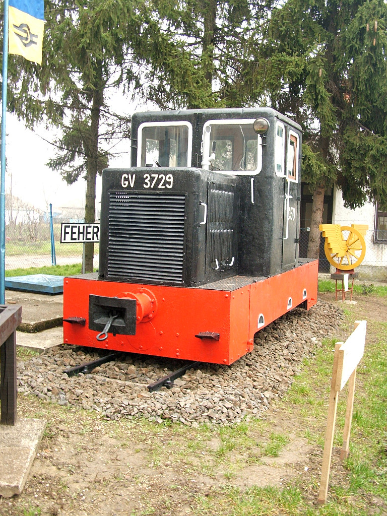 A GV 3729 pályaszámú C–50 sorozatú mozdony kiállítva Fehérgyarmat állomáson